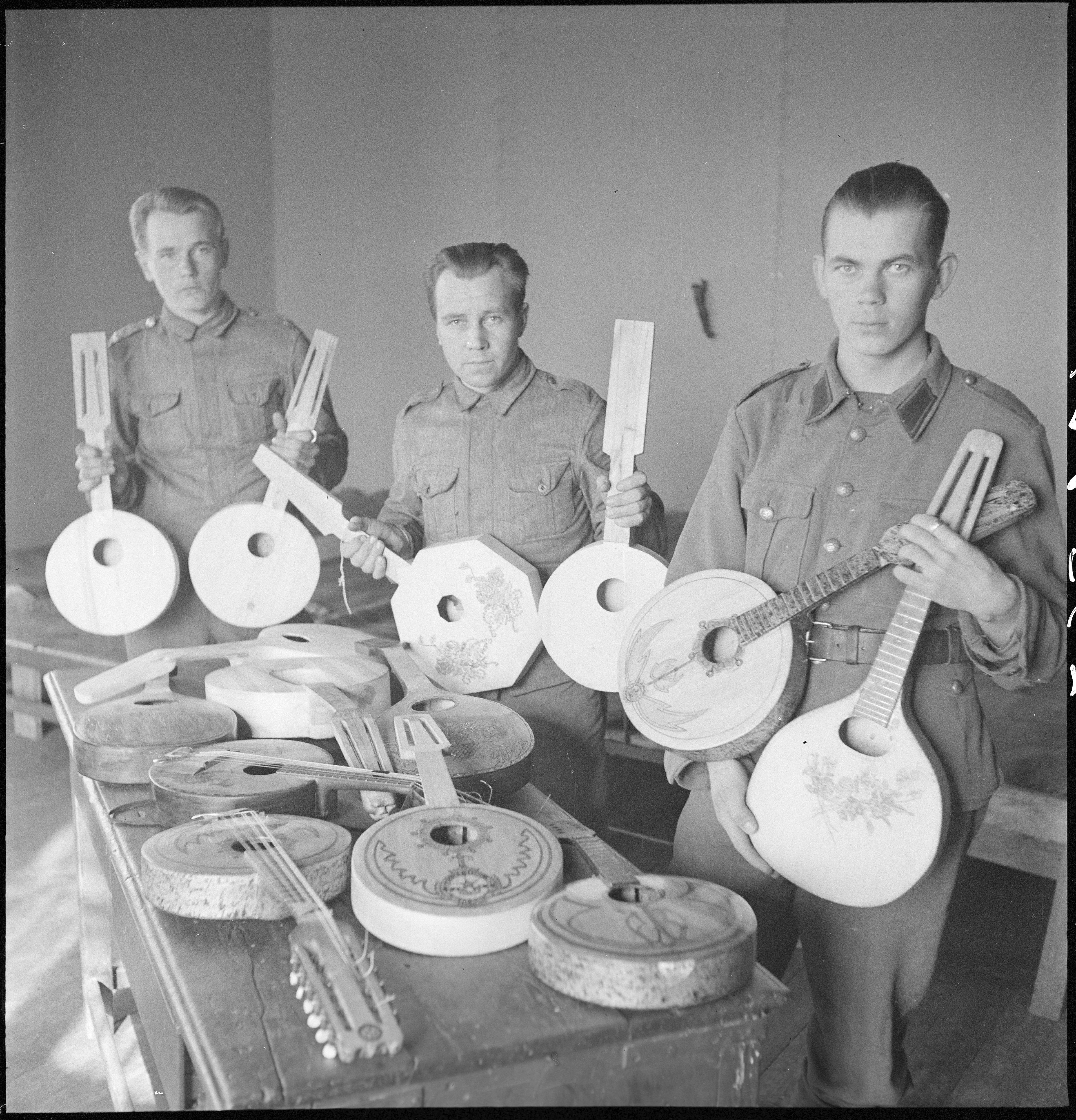 Kolme tekijää mandoliinipöydän ääressä. Mökerikkö